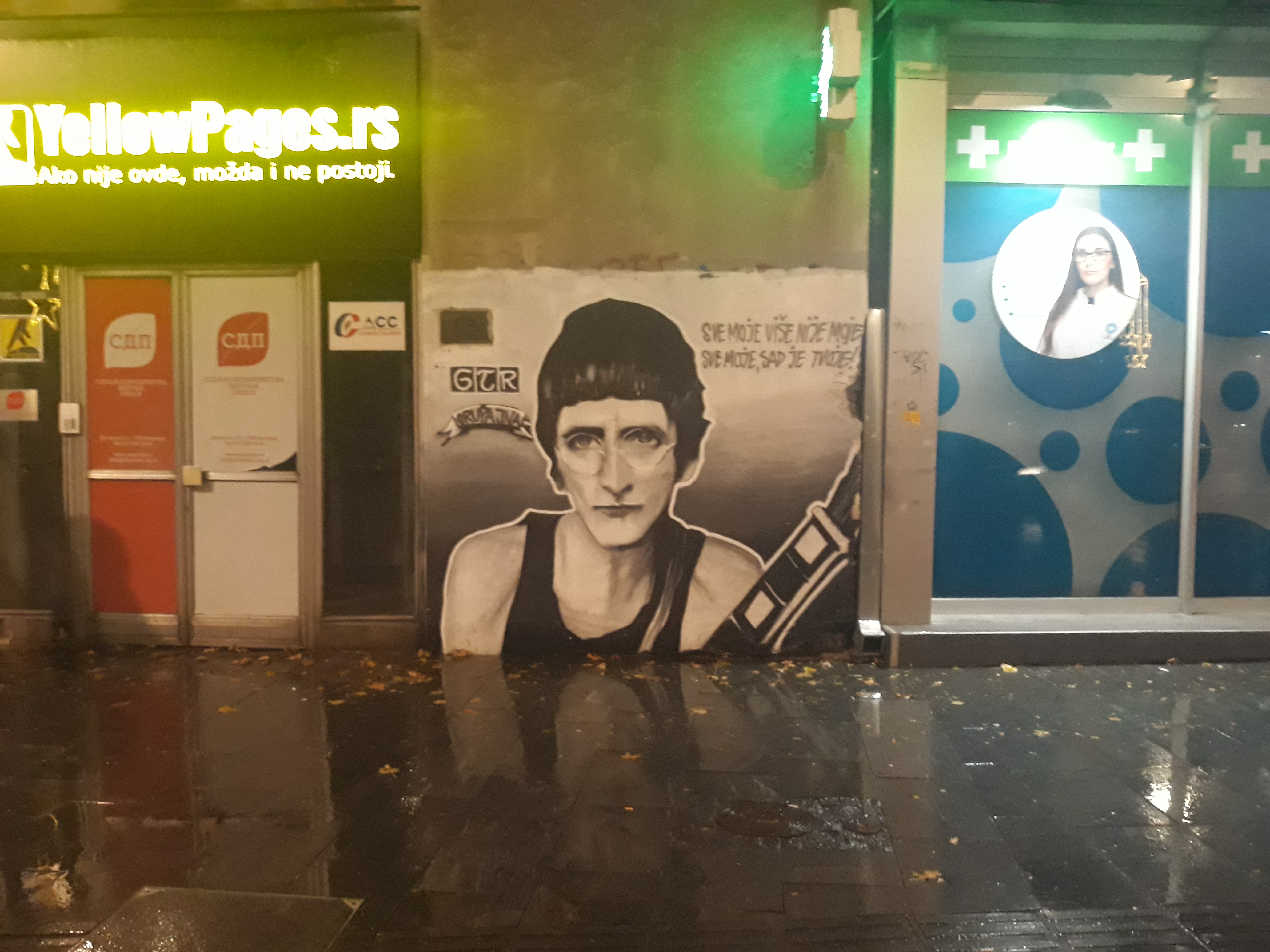 Мурал посвећен музичару Срђану Гојковићу Гилету у близини београдског Дома омладине.